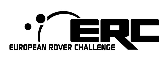 Logo European Rover Challenge